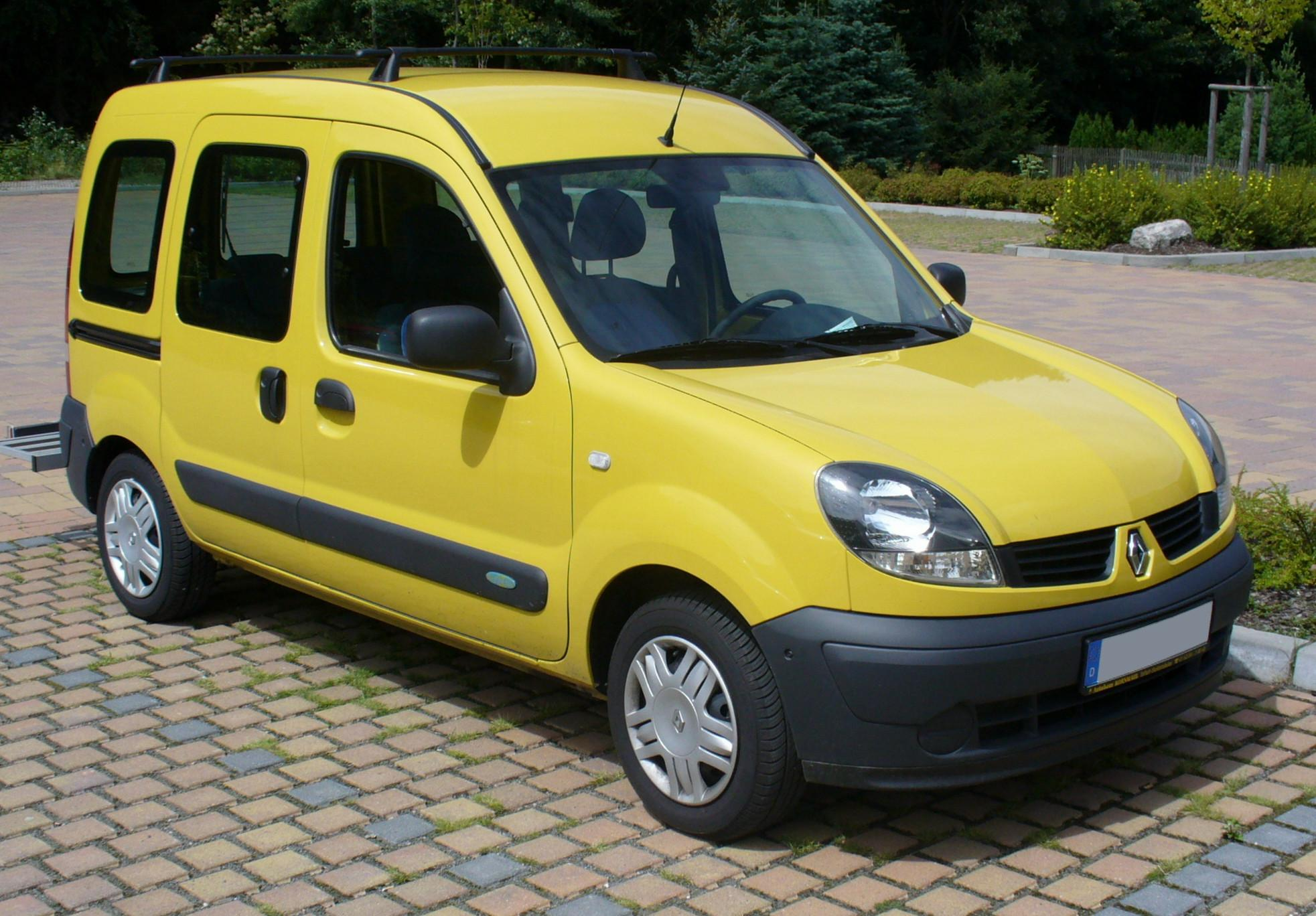 Renault Kangoo I